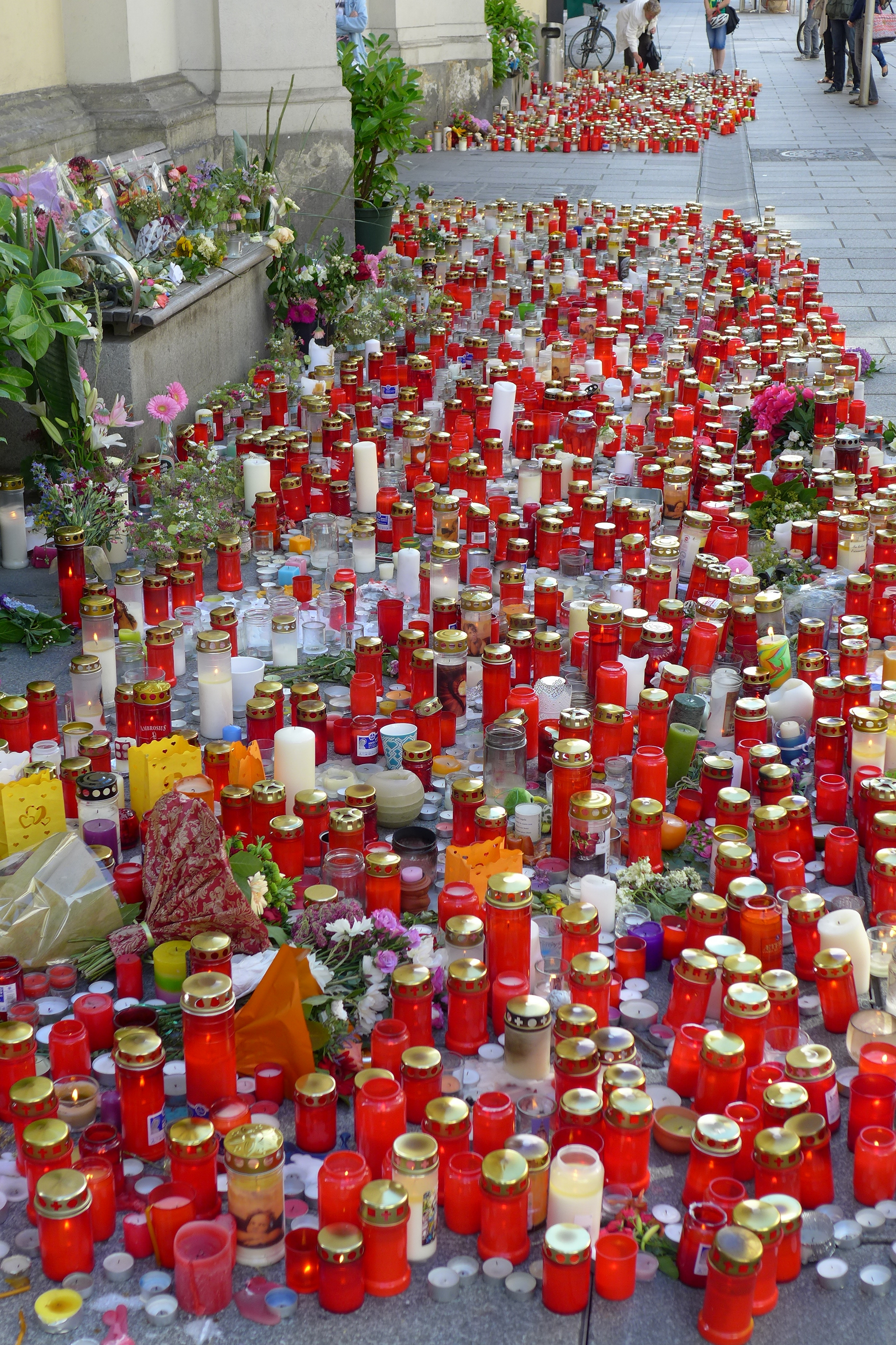 Stadtpfarrkirche Graz, Ort des Gedenkens an die Opfer der Amokfahrt in Graz (20. Juni 2015)